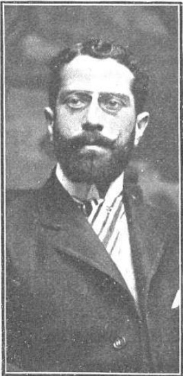 Luis Sáinz, católico, de Kaulak.